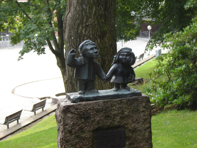 Emil och Emilia, statue at Chalmers tekniska högskola. Photographer:Anders Jonsson